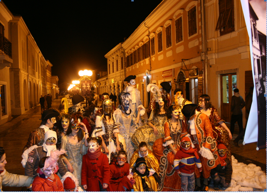 Karnevalet Shkoder